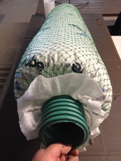 Valmissalaojaputken rakenne